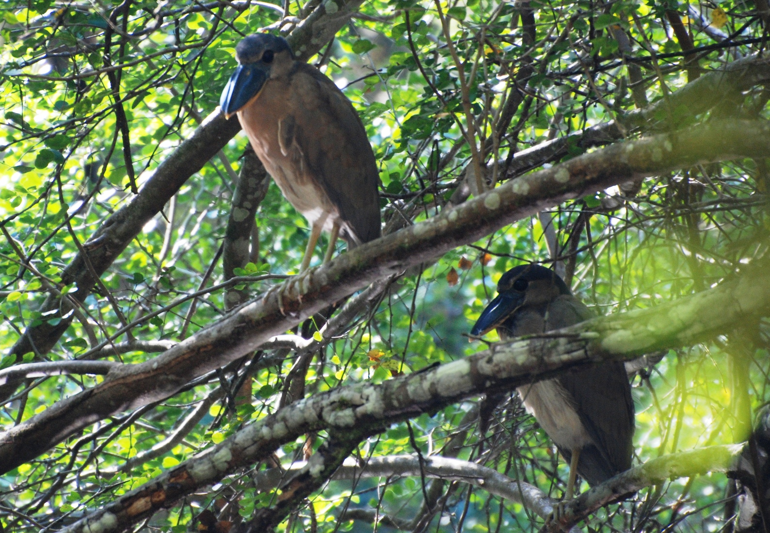 Kahnschnabel in Calakmul